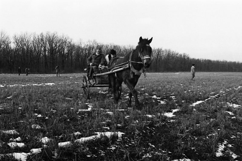 During filming movie "Viforul rosu". Criuleni district.